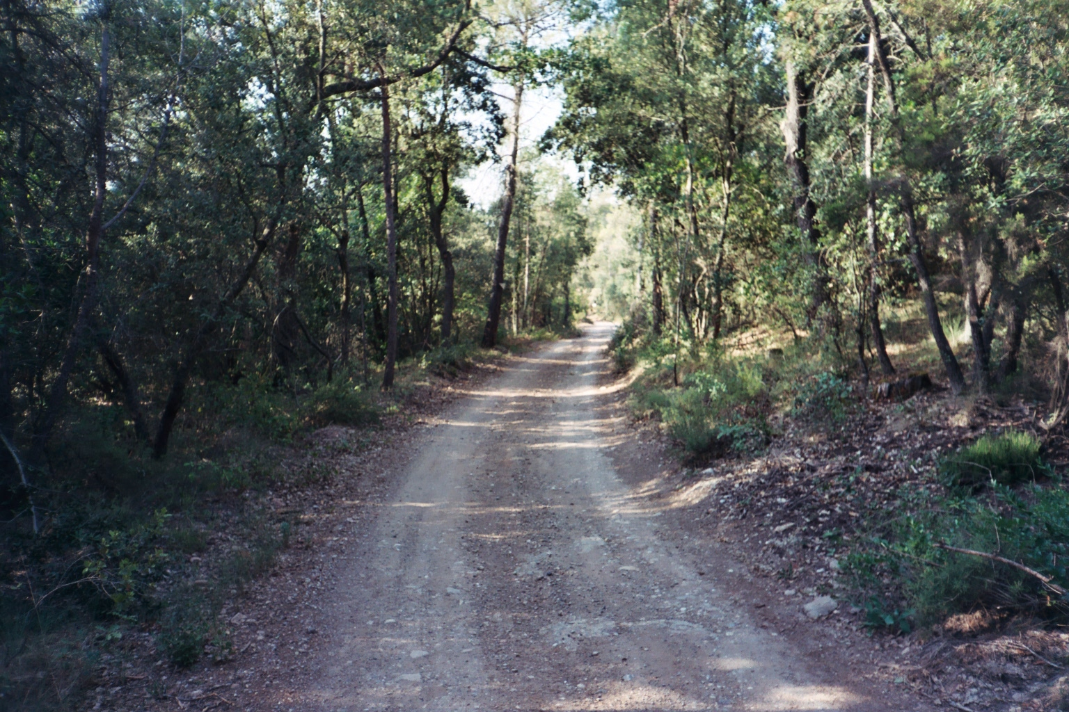 Camí de Mussarra al Coll de Lligabosses (Monistrol de Calders, Moianès)